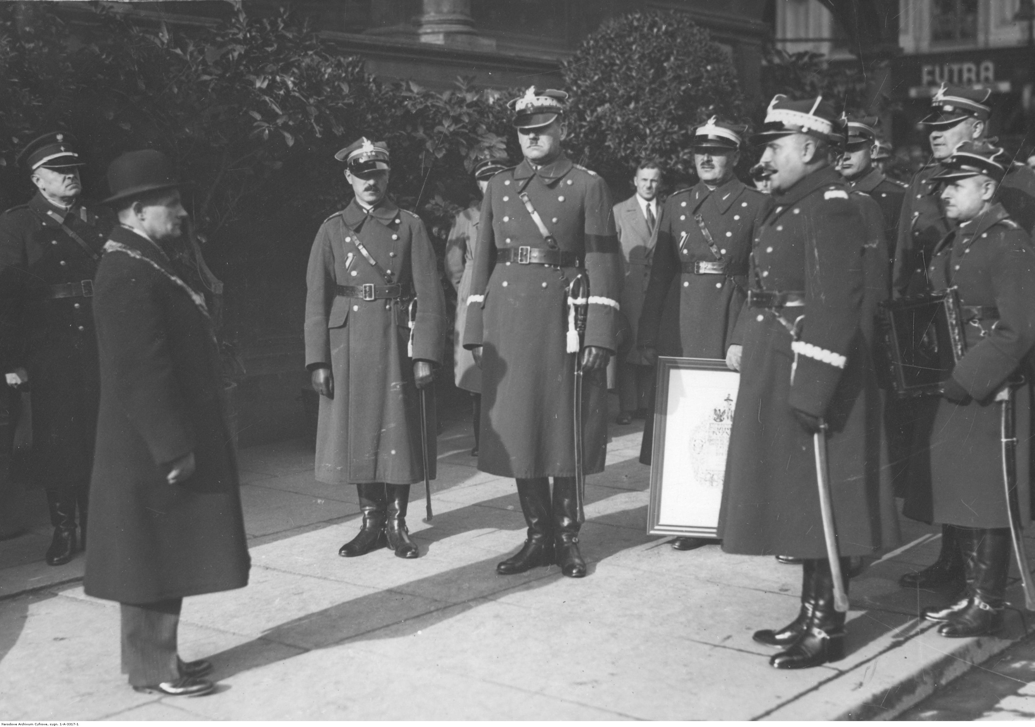 Wręczenie Poznaniowi odznaki honorowej 14 Wielkopolskiej Dywizji Piechoty ofiarowanej miastu z okazji 15 lecia tej dywizji. Prezydent Poznania Erwin Więckowski wysłuchuje przemówienia d-cy 14 DP gen. Franciszka Włada. Widoczni m.in. d-ca OK VII Poznań gen. Oswald Frank, d-ca piechoty dywizyjnej w 14 DP płk Franciszek Alter. Koncern Ilustrowany Kurier Codzienny - Archiwum Ilustracji. Sygnatura: 1-A-3317-1